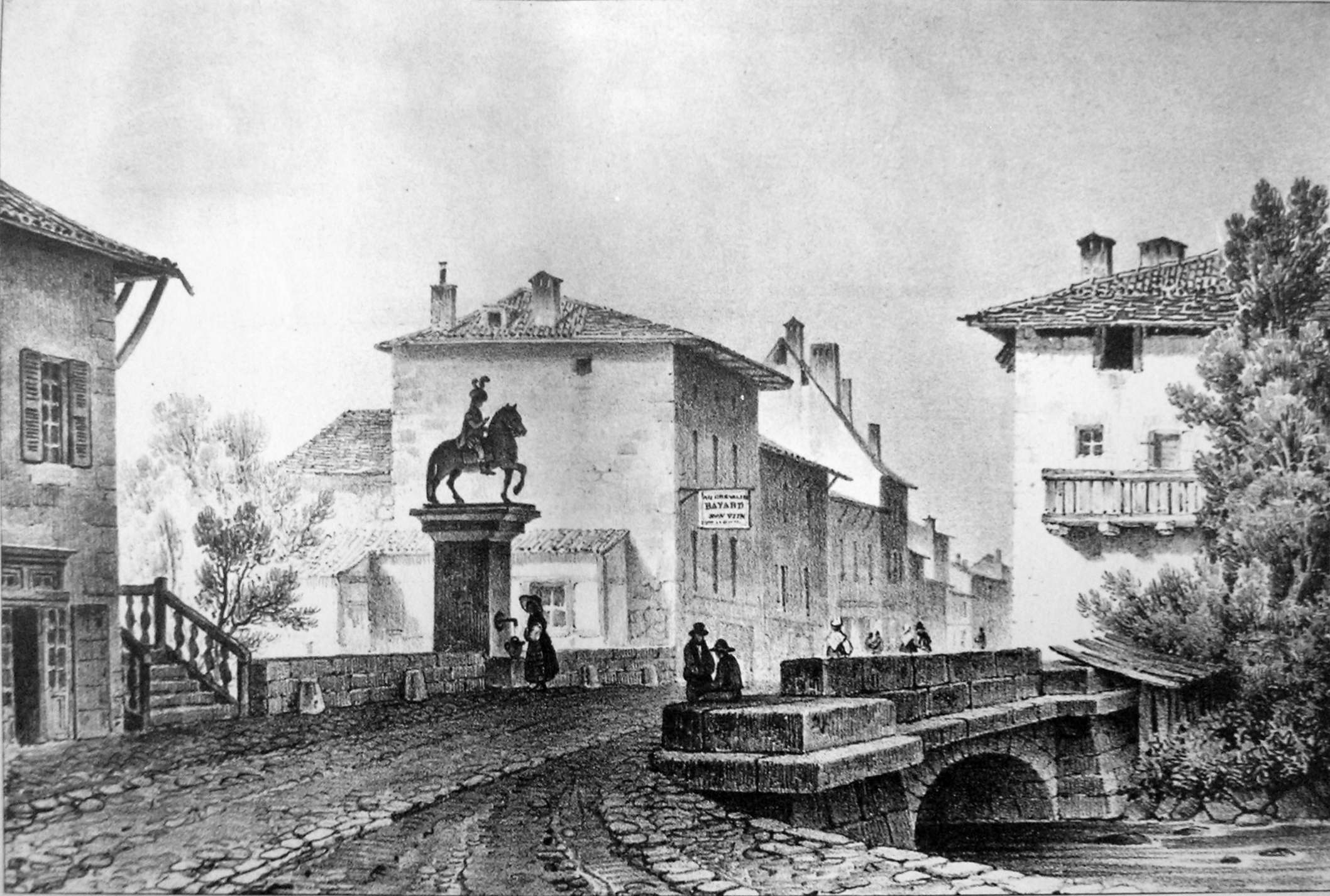 Pontcharra (Isère) ATTENTION ! Ce facsimilé est réalisé en applicant des alterations avec un logiciel graphique à une copie numérique, obtenue à partir d'une prise de photo faite par un non-professionnel. Elle pourrait ne pas être parfaitement réussie.